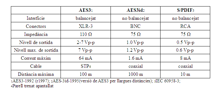 Comparació de la capa de transport de AES/EBU i S/PDIF